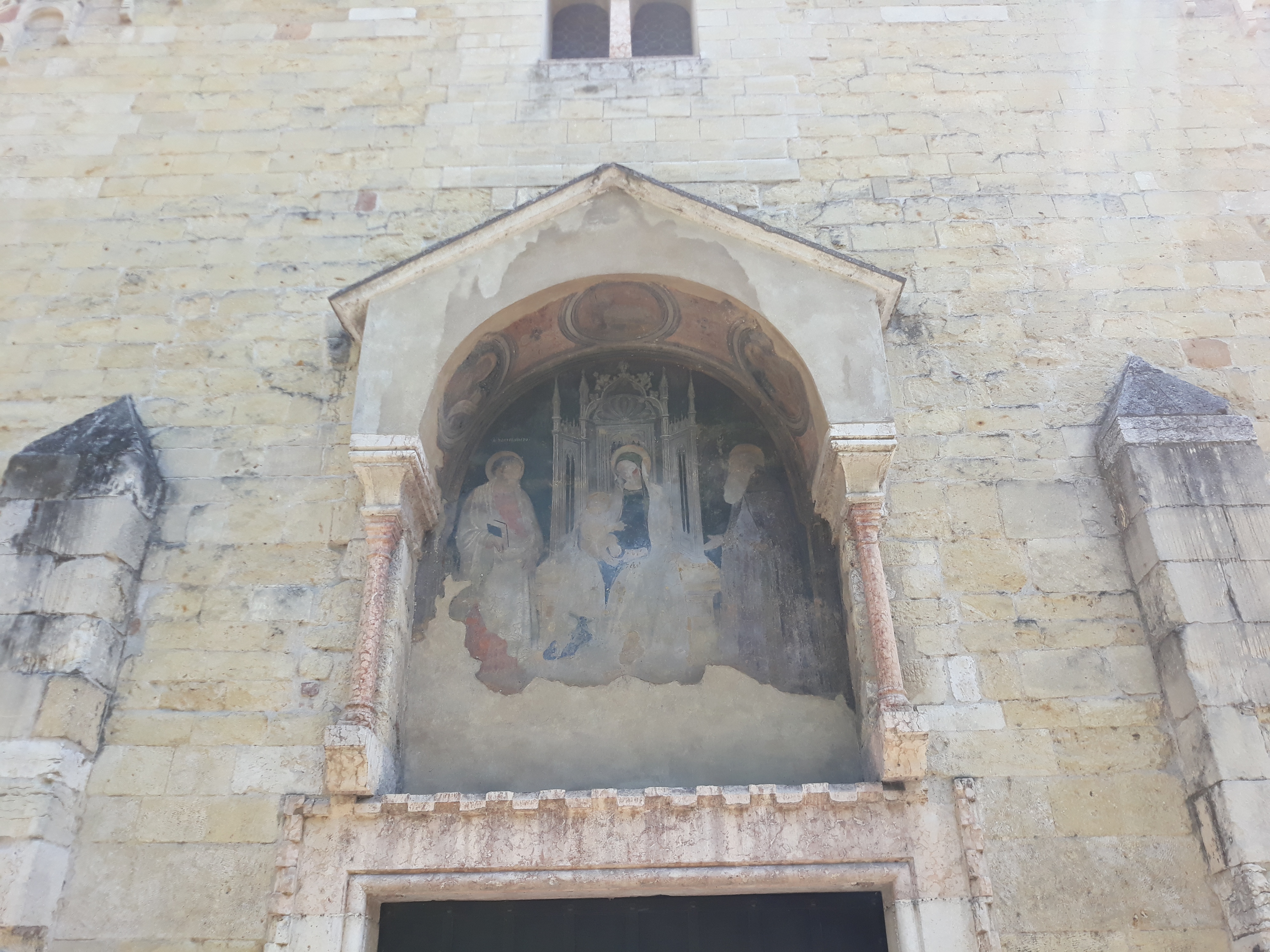 Chiesa di San Giovanni in Valle a Verona